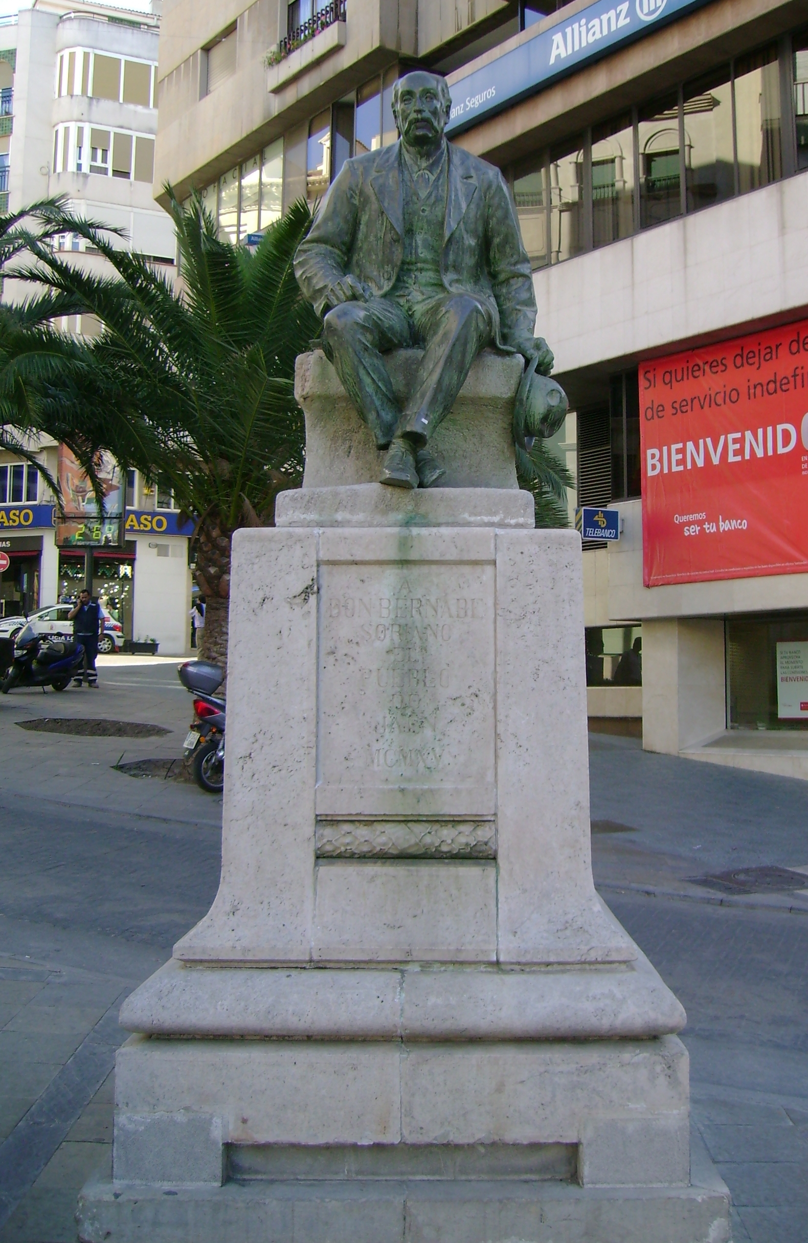 Estatua de Bernabé Soriano, en Jaén.